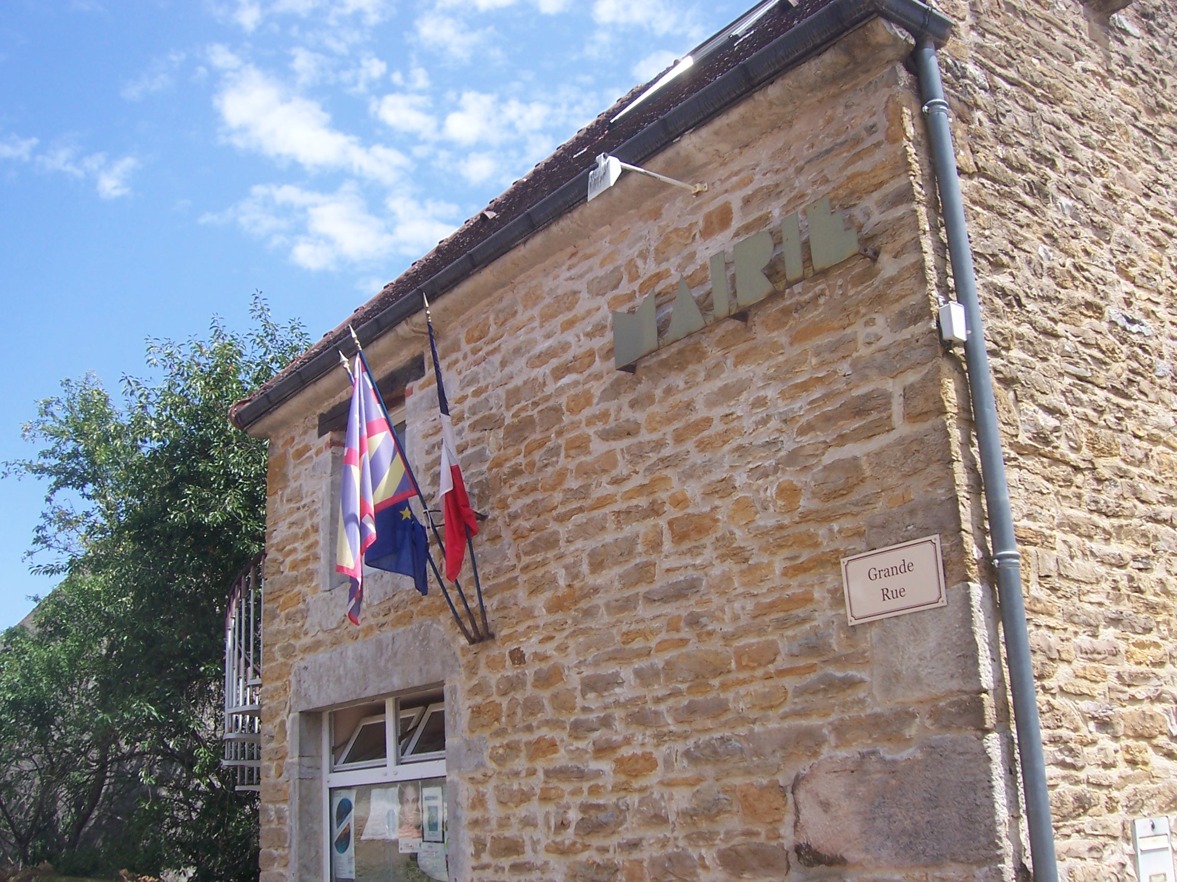 Mairie de Chevagny-sur-Guye